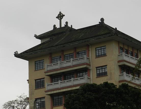 中文（香港）: 聖神修院, 鴨脷洲, 香港